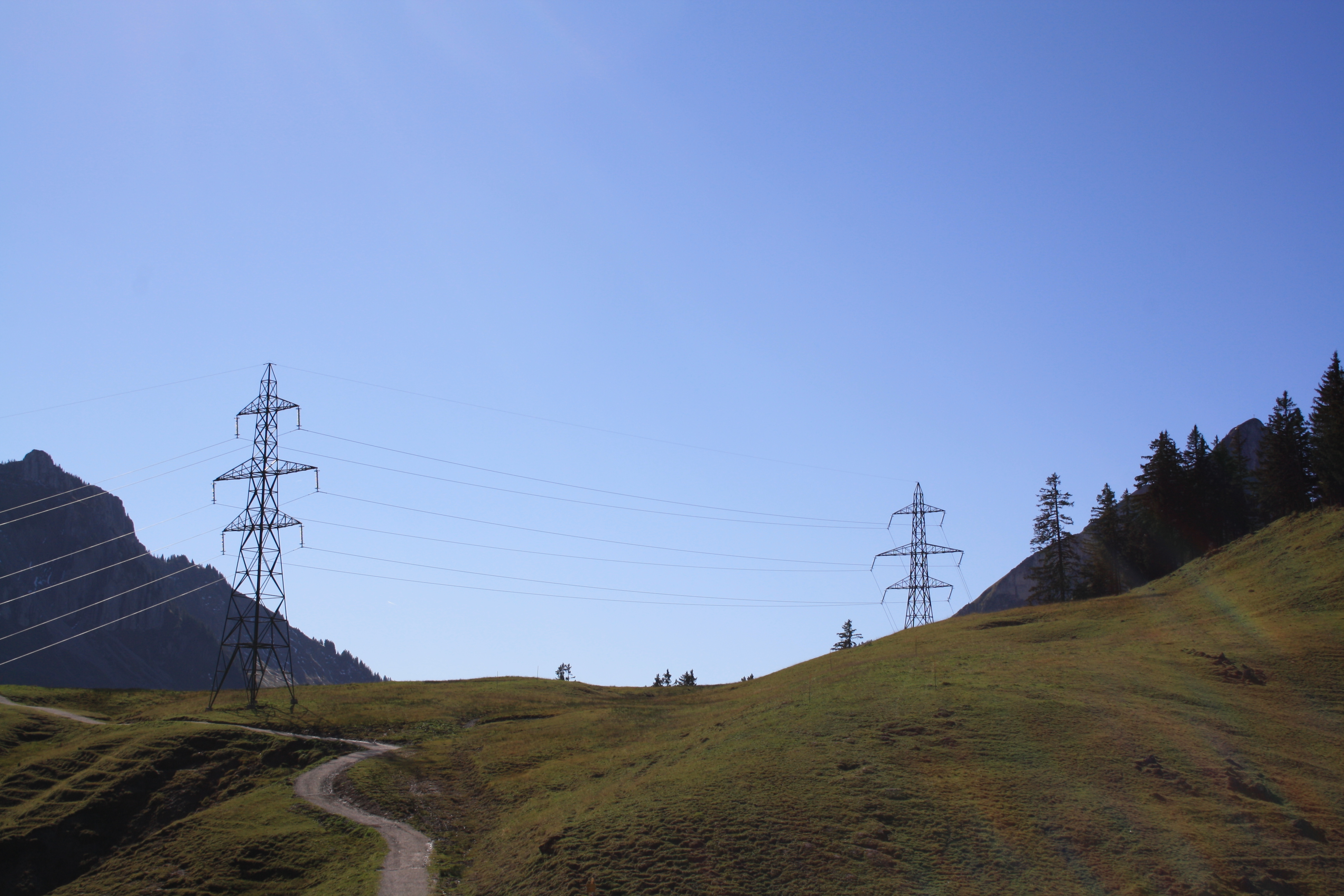 Von der Riggisalp zum Euschelspass